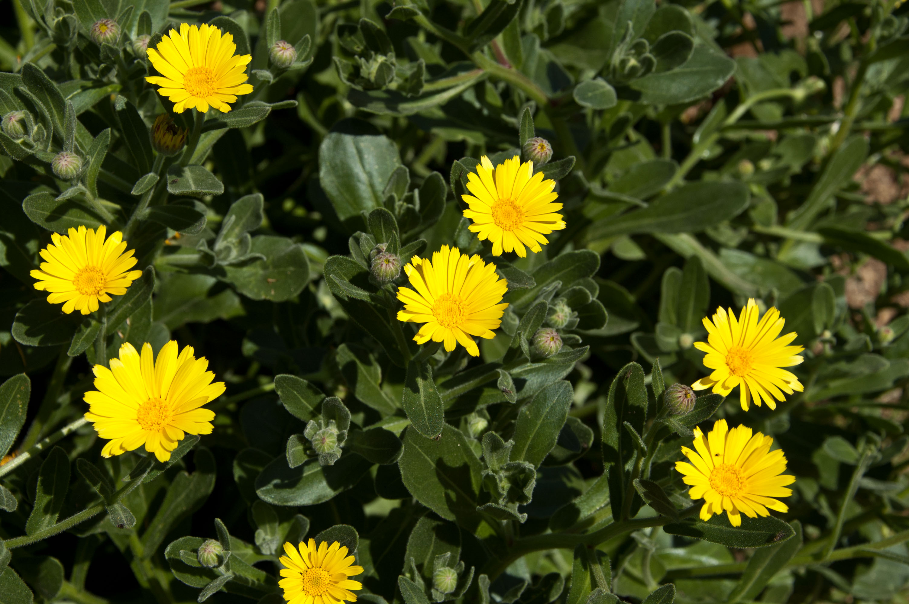 Calendula maritima Orto botanico di Palermo